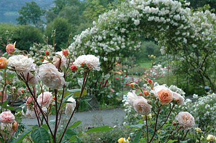 I sørhellingen mot Fanafjorden ligger Arboretets Rosarium, en utstilling av over 500 ulike roser (slekten Rosa). Rosesamlingen er ikke bare Norges største, men også en av Nordens største.